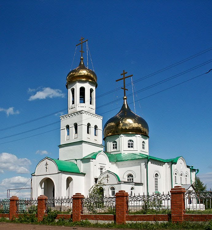 Церковь Илии Пророка. Храм однопрестольный, построен в 1990г. на средства благотворителей. Строительство началось в 1988 г.. Освящен в честь св. прор. Илии. С этого времени в нем совершаются богослужения. Имеется воскресная школа - 43 учащихся.